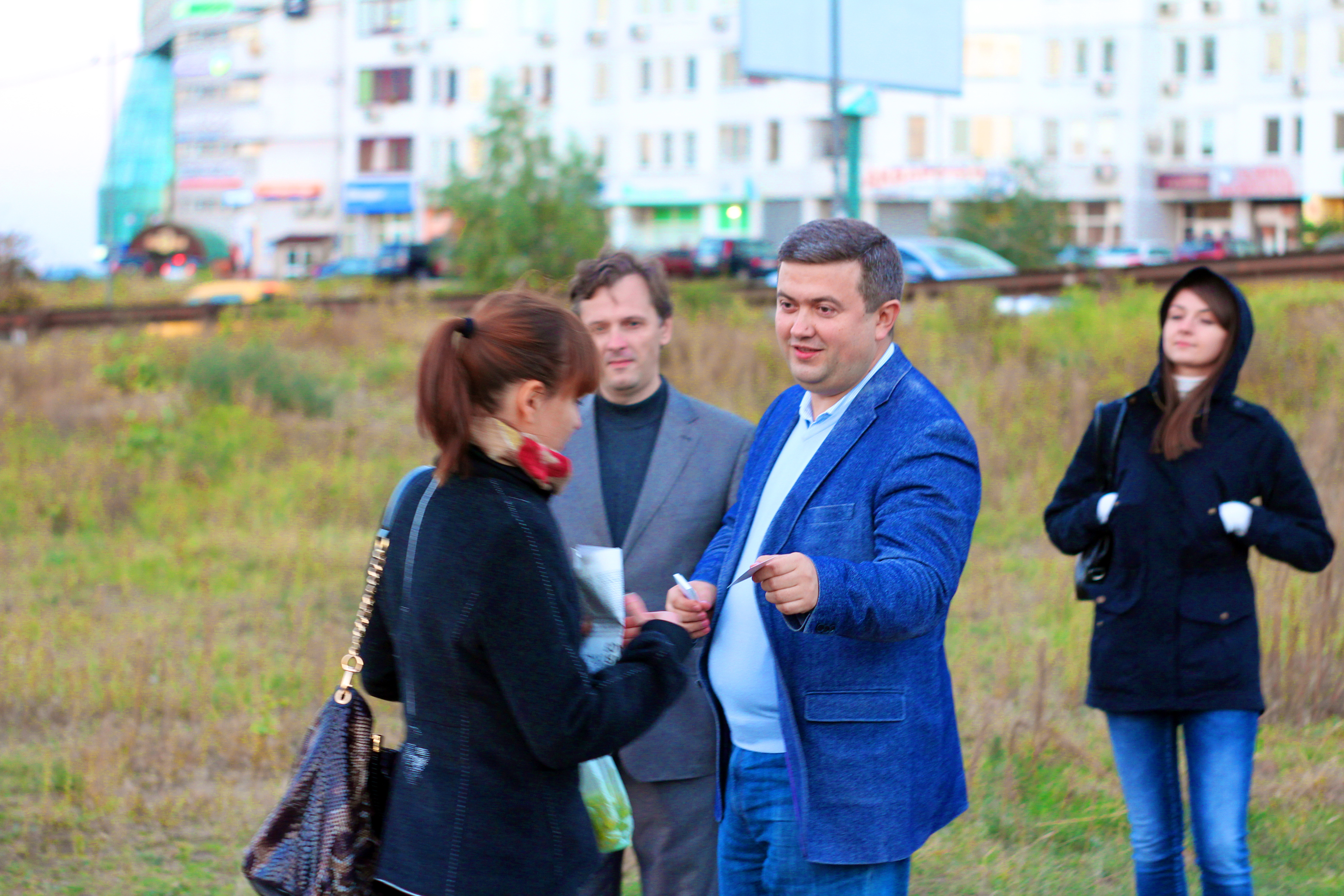 Фото. 2015